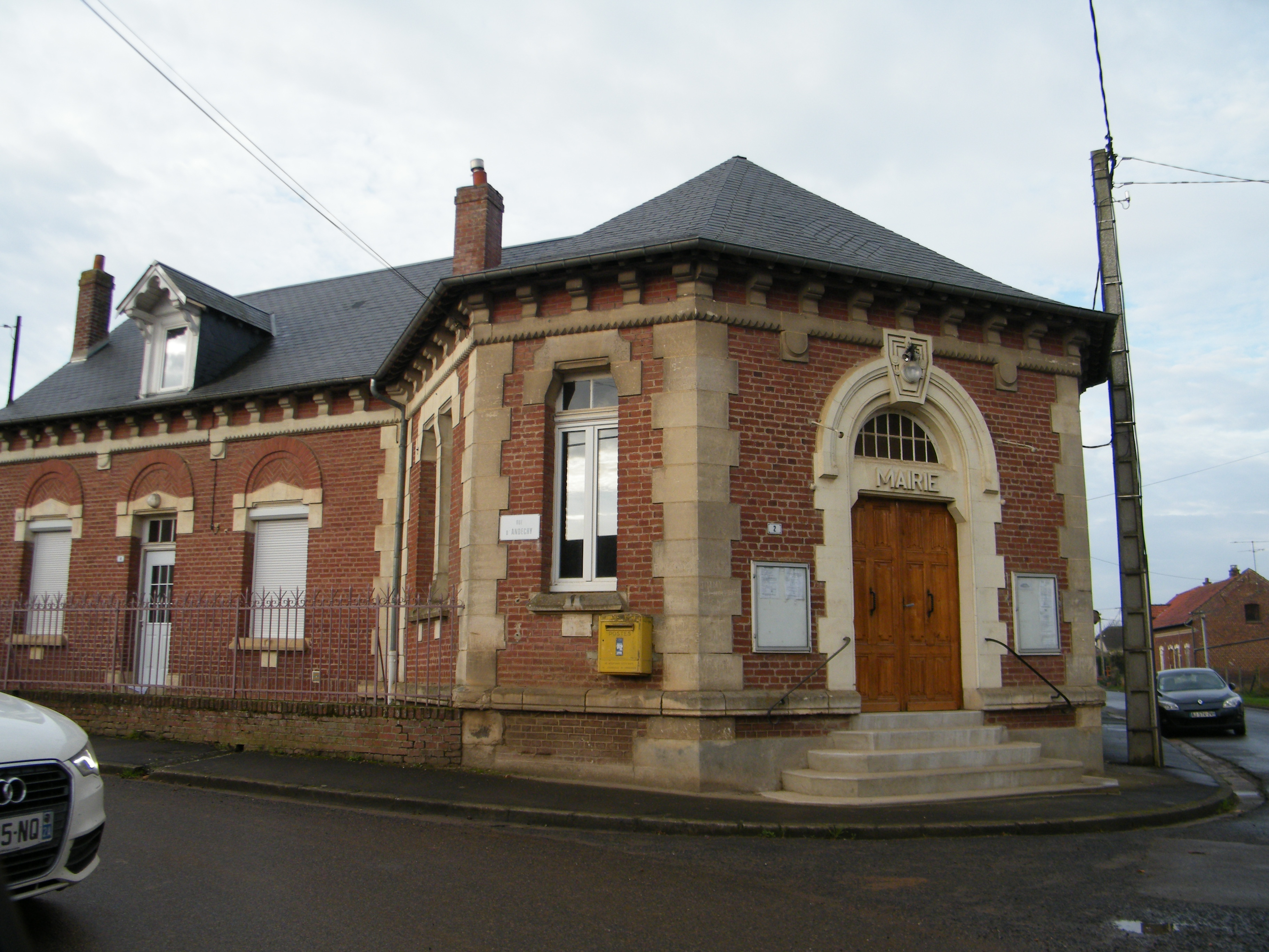 Mairie.